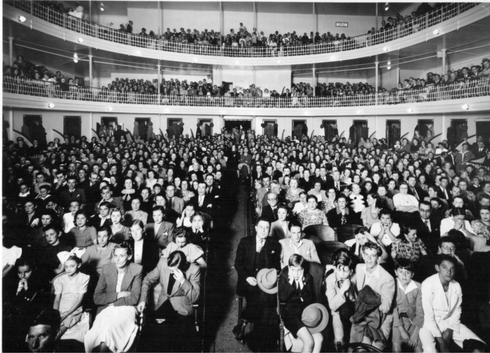 Platéia do Teatro na peça Branca de Neve em 22/11/1940